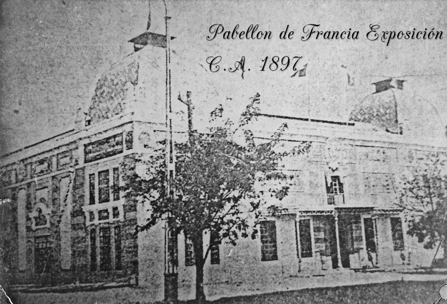 Exposición centroamericana de 1897.